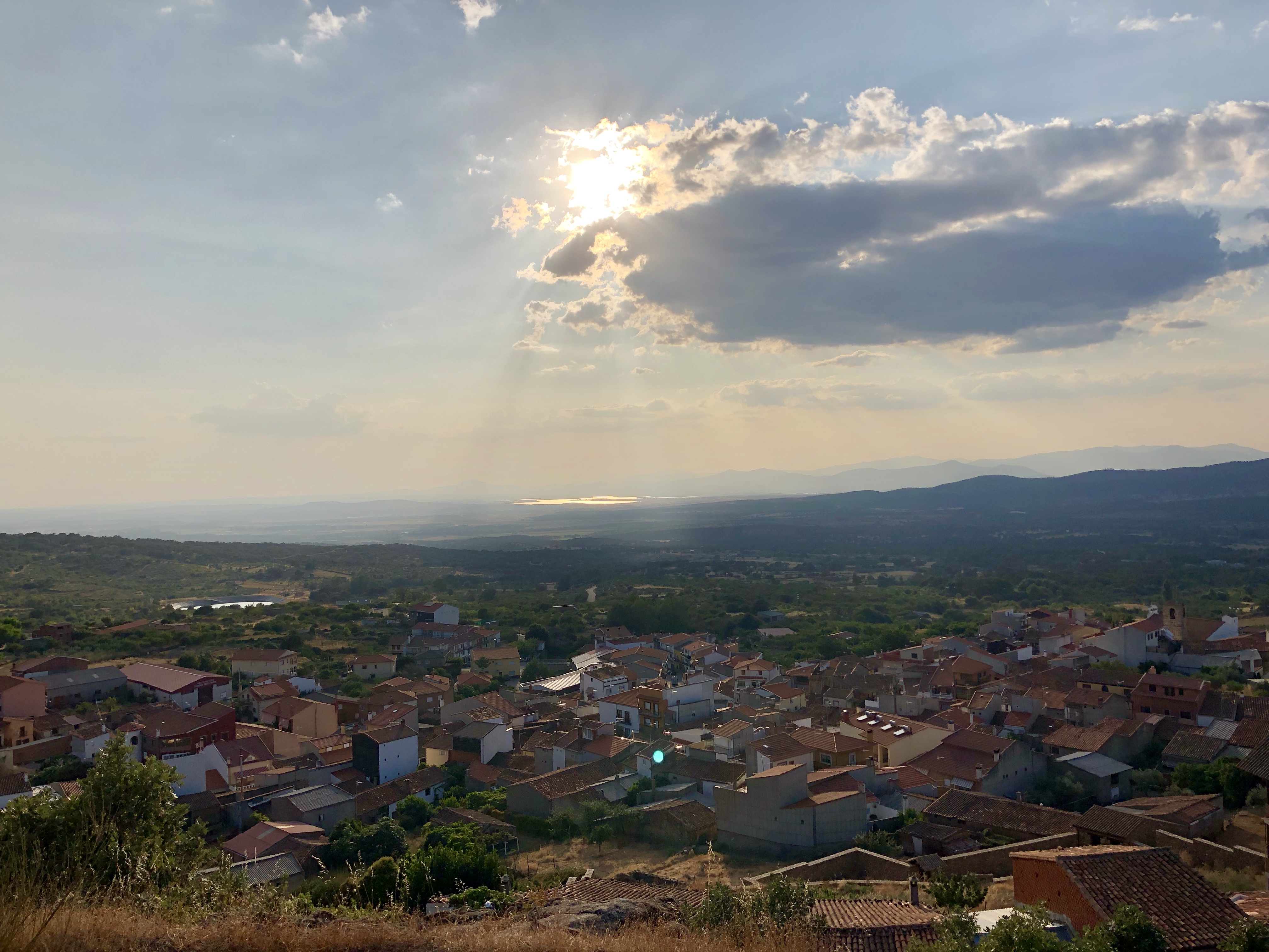 Vista de Gargantilla desde la Peña Llana, también conocida como la "Pella Llana".